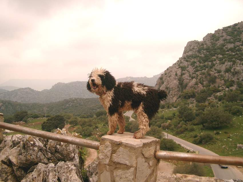 Perro de Agua in Ronda Autor: Susanne Lorenz eigenes Werk aufgenommen 4.2004